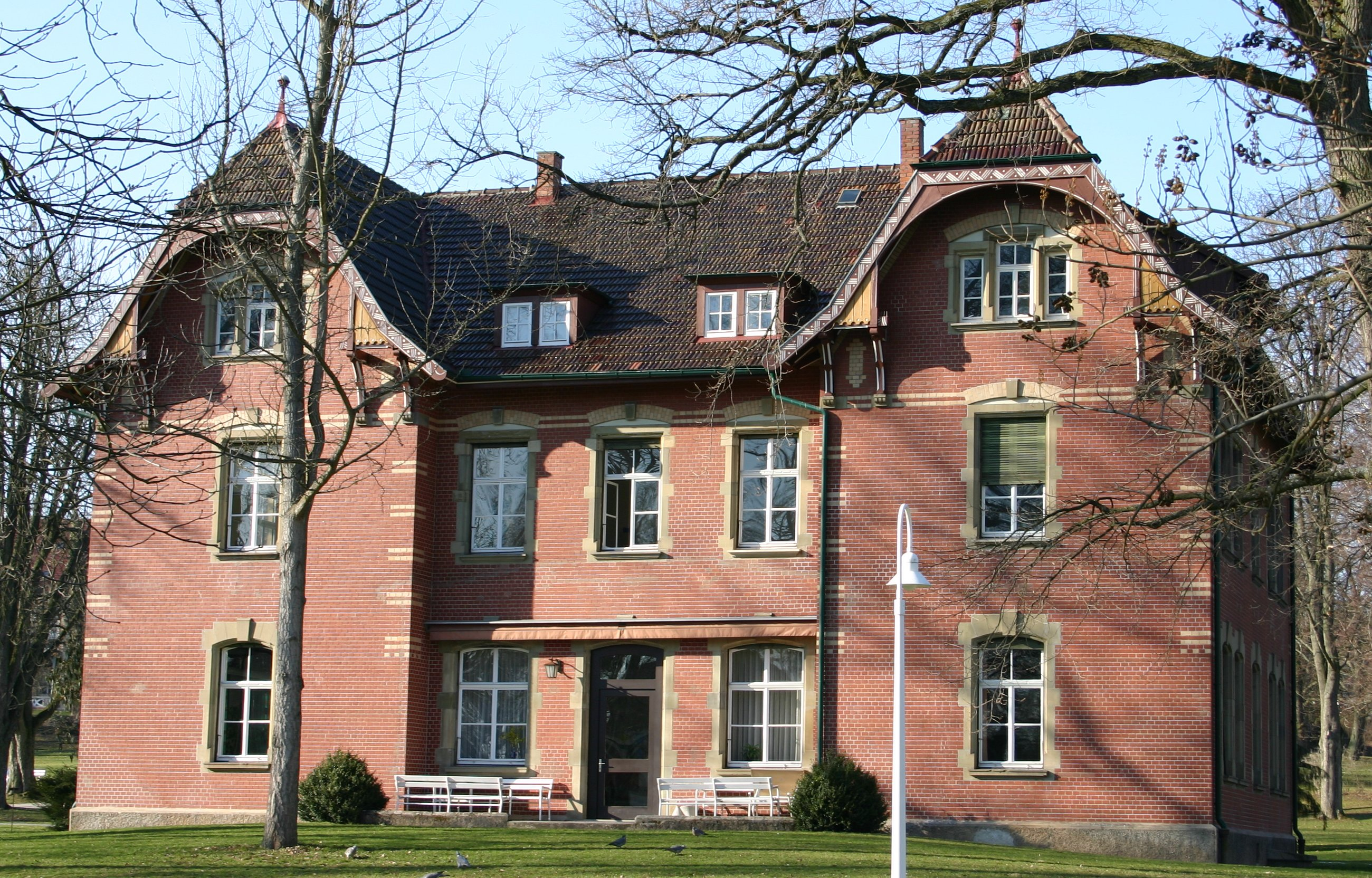 Klinikum am Weissenhof, Krankenpflegeschule, Südansicht